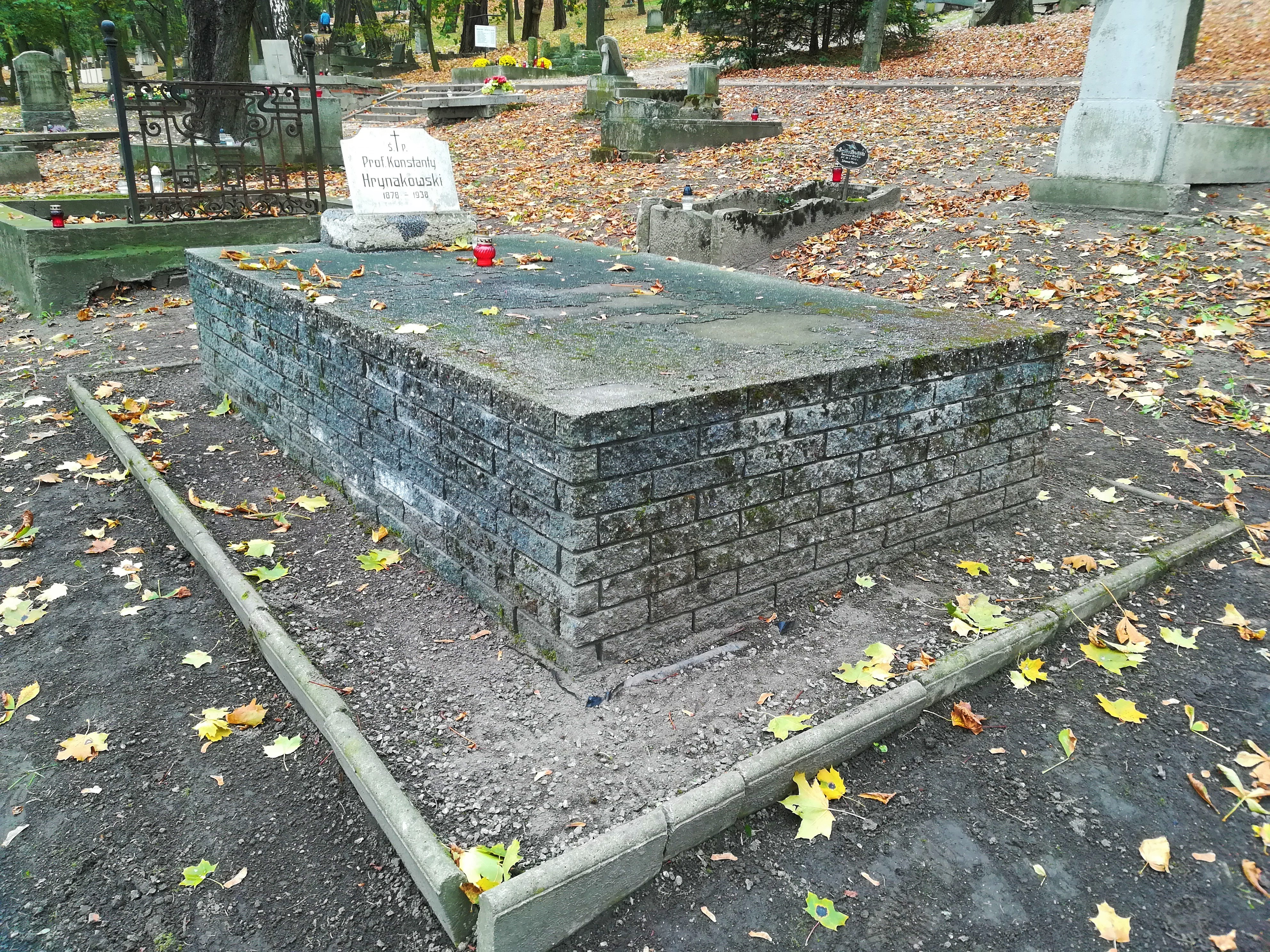 Grób prof. Konstantego Hrynakowskiego na cmentarzu świętowojciechowym na Cytadeli w Poznaniu.